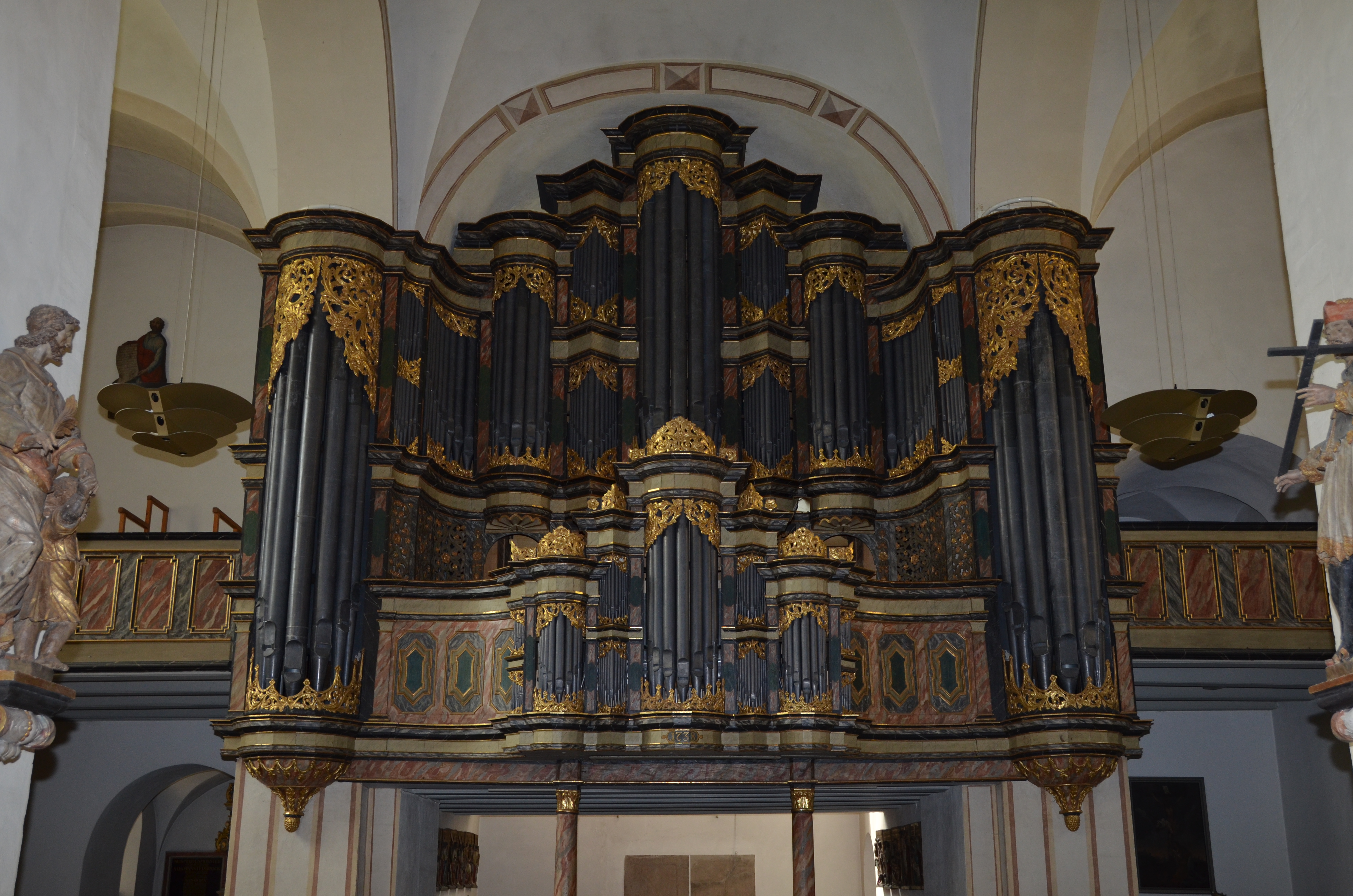 Die barocker Möller-Orgel der Abtei Marienmünster.